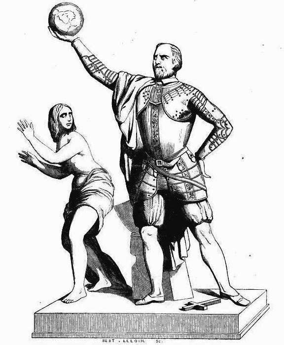 "La Découverte de l'Amérique, groupe en marbre par Persico, sur l'une des façades du Capitole de Washington".